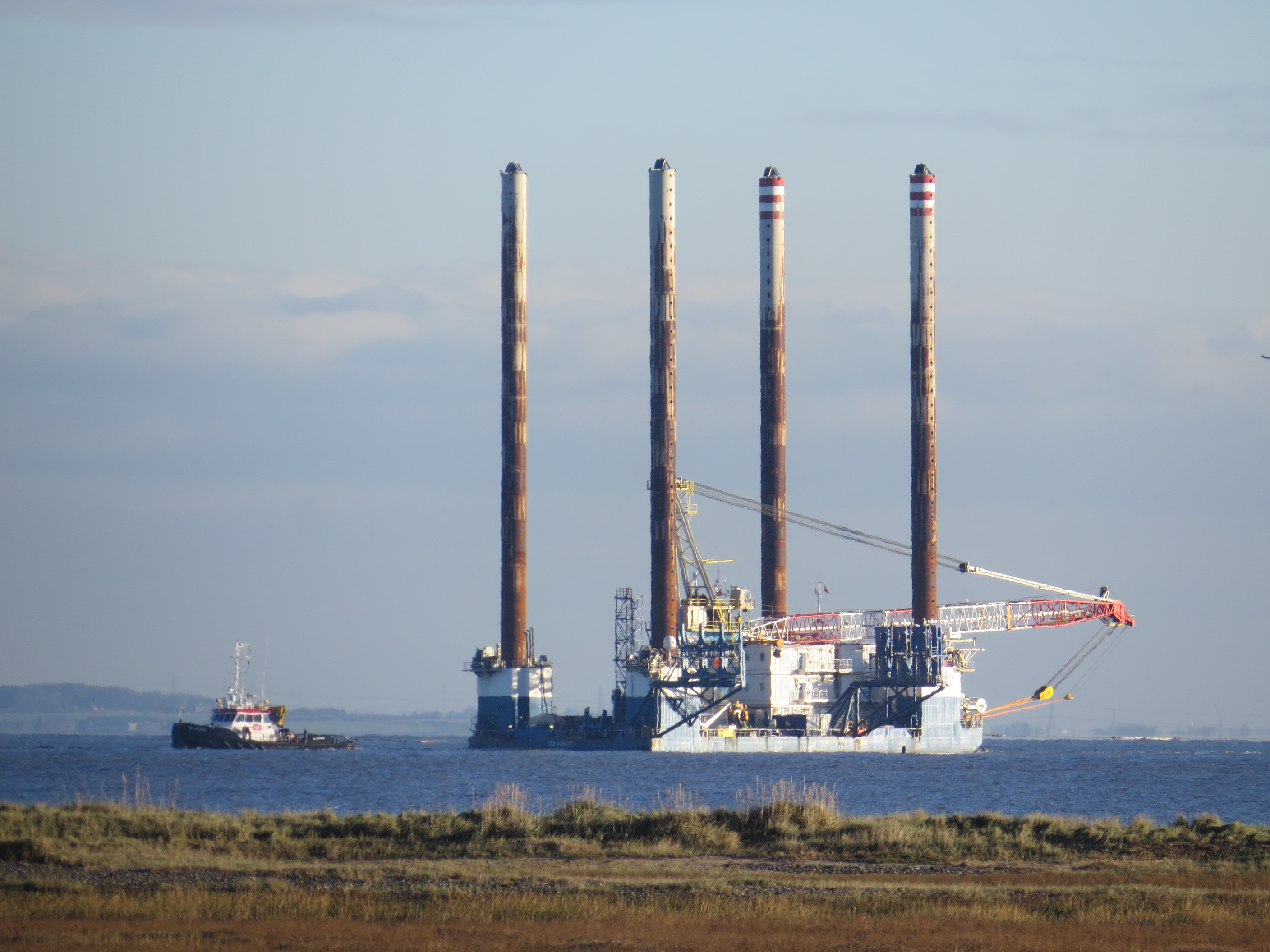 platfform olew o guddfan RSPB Parlwr Du